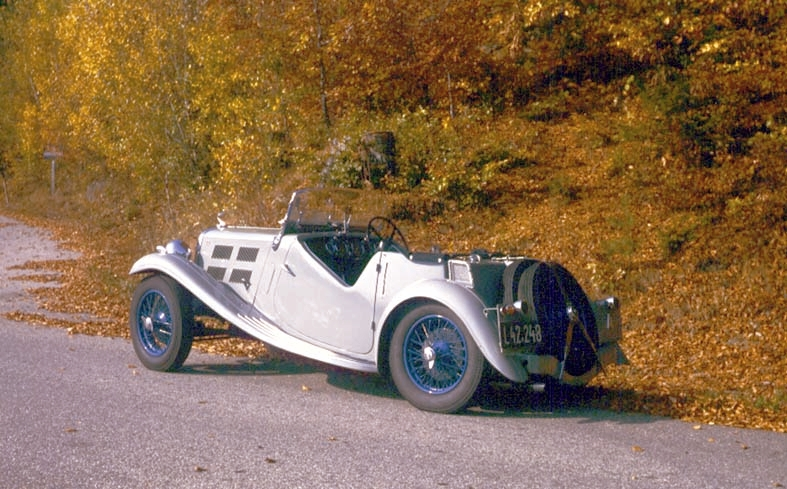 Sportzweisitzer Triumph Southern Cross